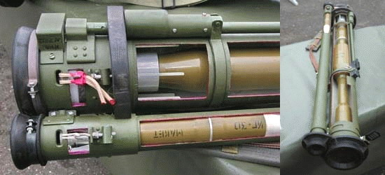 РПГ-30 или «Крюк»